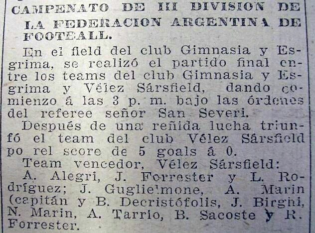 Foto del diario La Mañana del 21/12/1914 en donde se informa el campeonato de Vélez de Tercera división